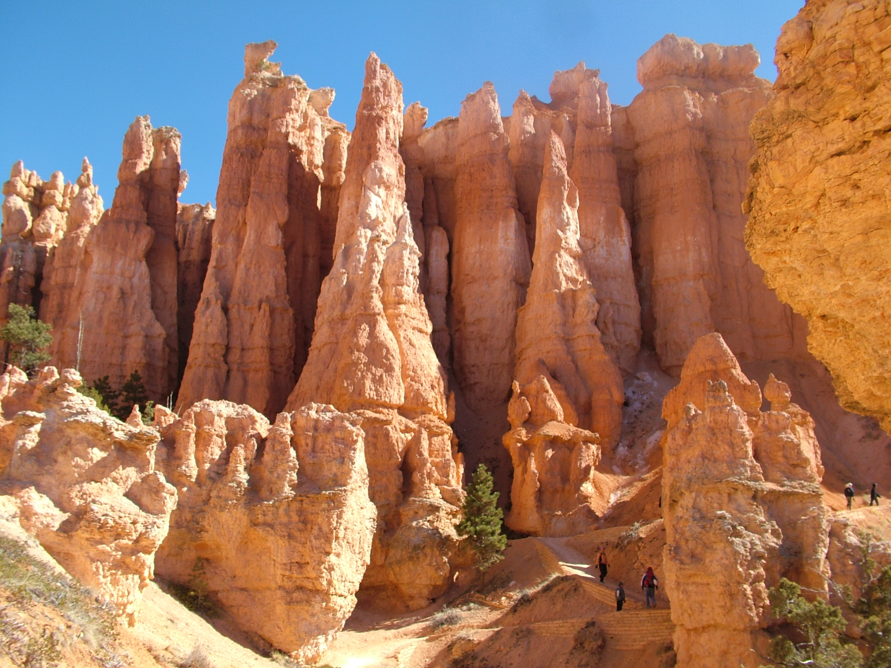 Bryce Canyon sziklaoszlopai, Utah, Egyesült Államok